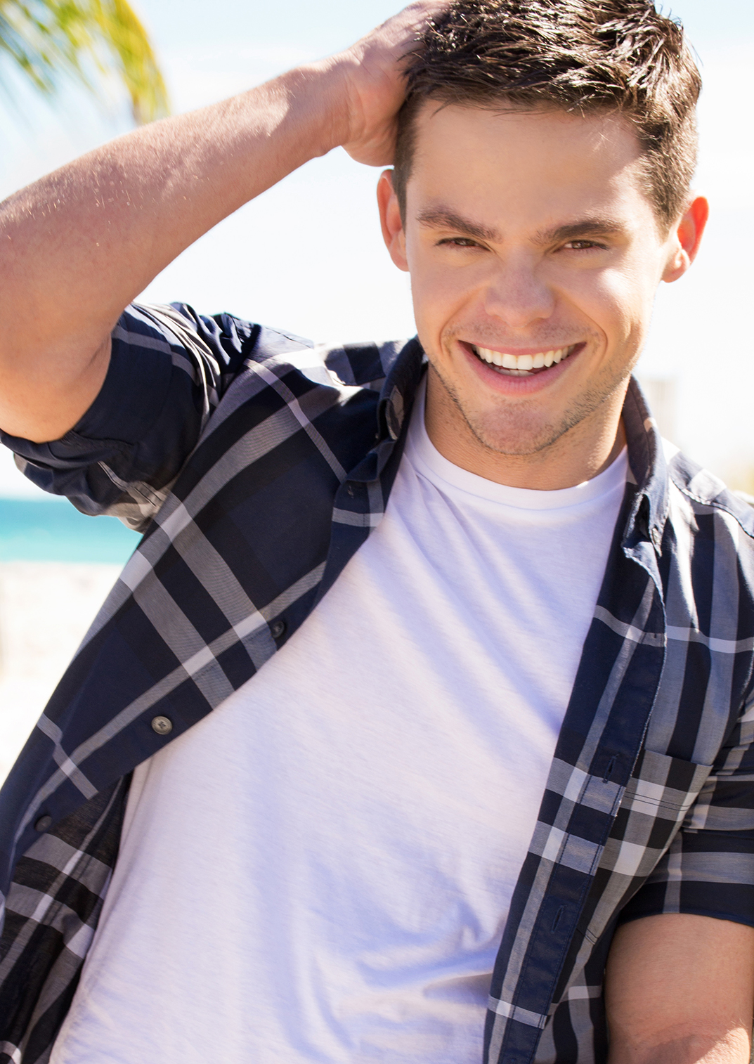 Foto de Willy Martin Copyright: Luis Luyando Management